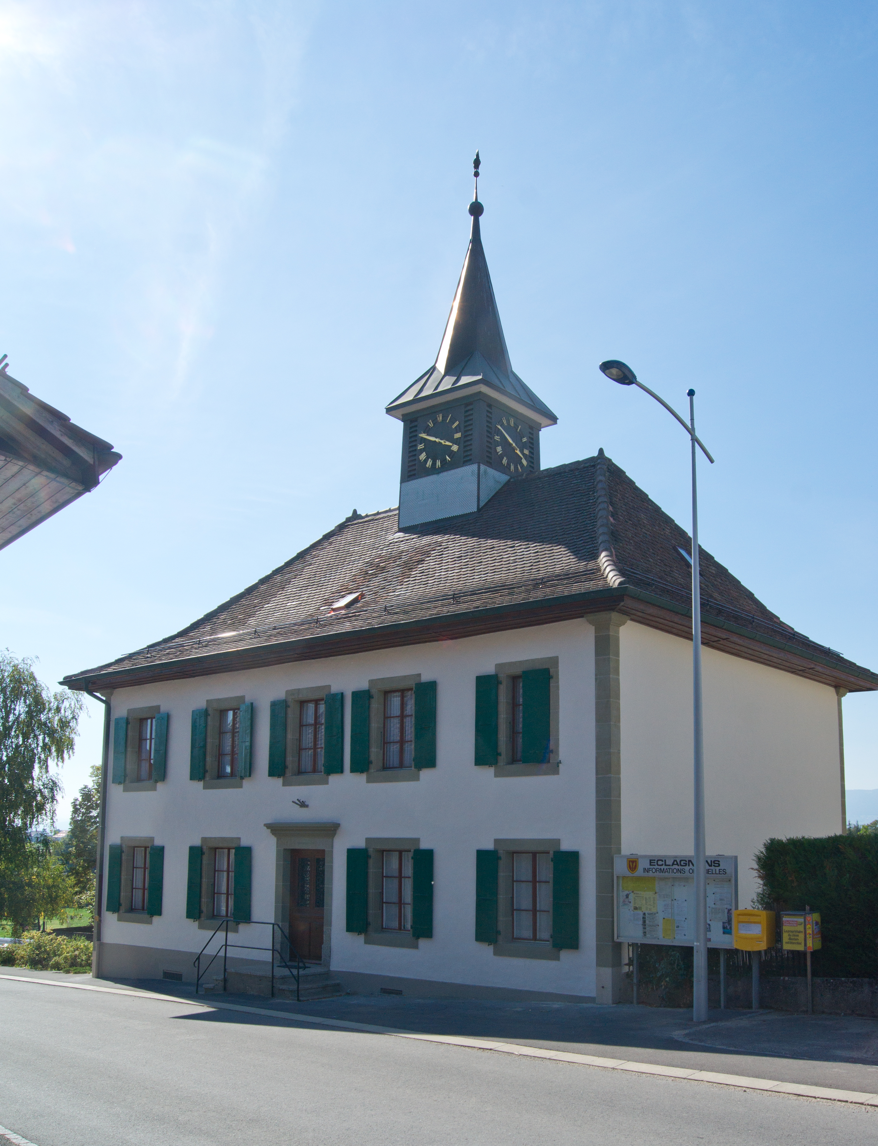 Maison de commune d'Eclagnens, canton de Vaud, Suisse.